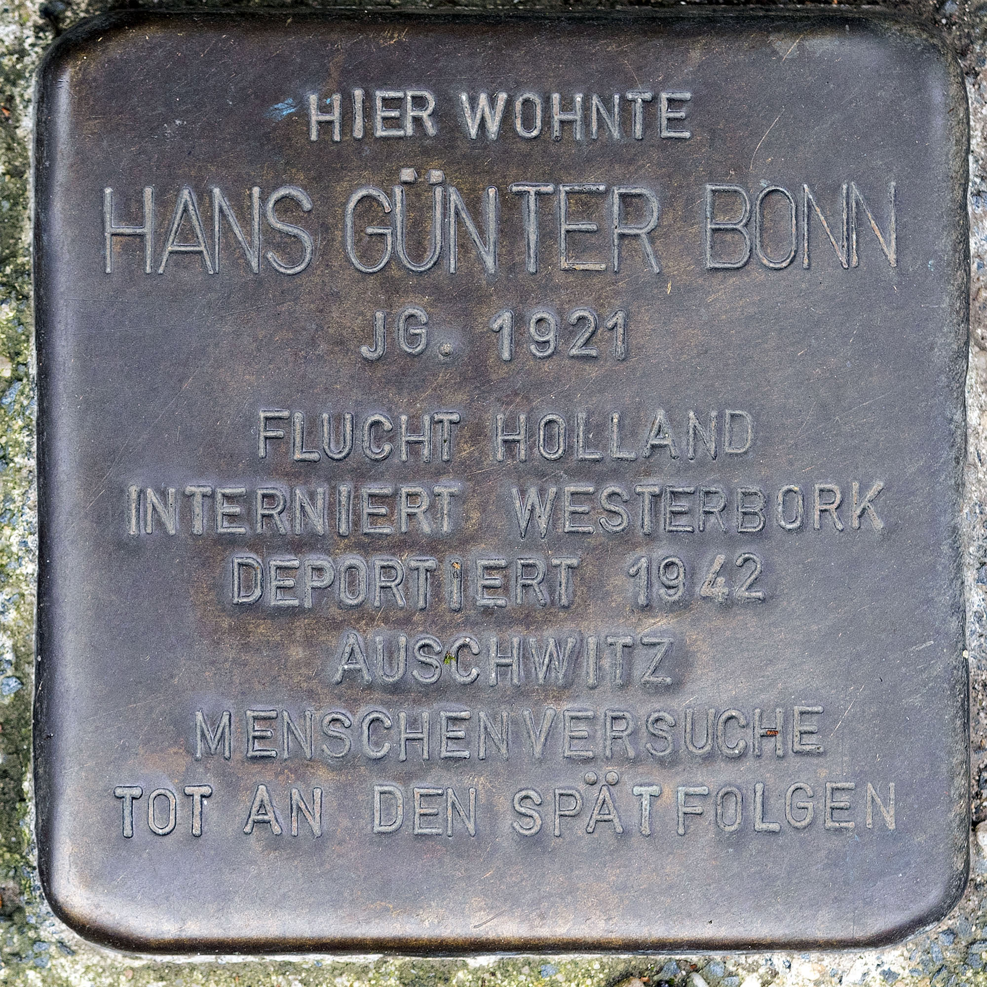 Stolpersteine Nettetal Bonn, Hans Guenter